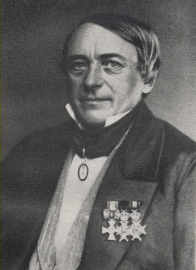 Friedrich von Hagenow (1797-1865)